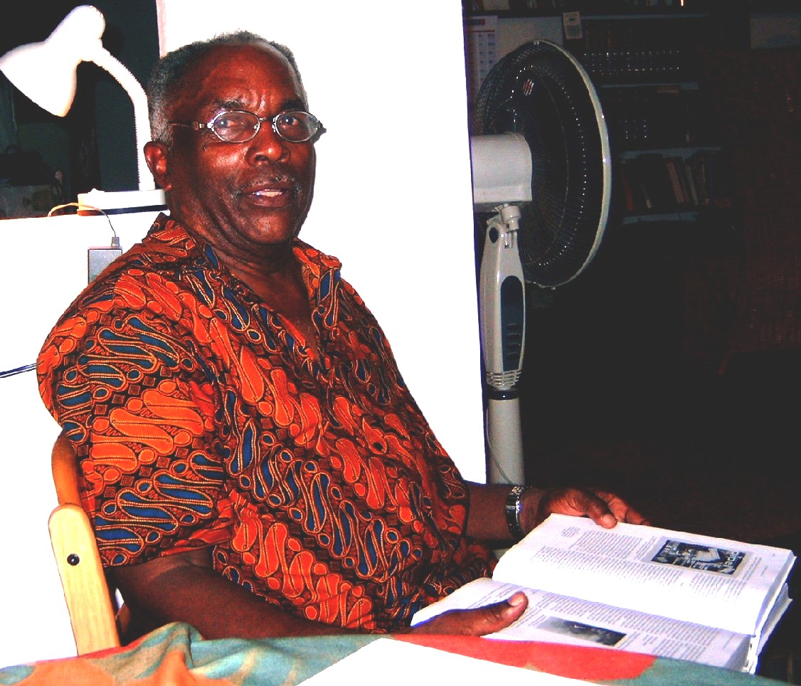 De Antilliaanse schrijver Frank Martinus Arion, 30 oktober 2005. Eigen opname, vrijgegeven voor publiek domein.